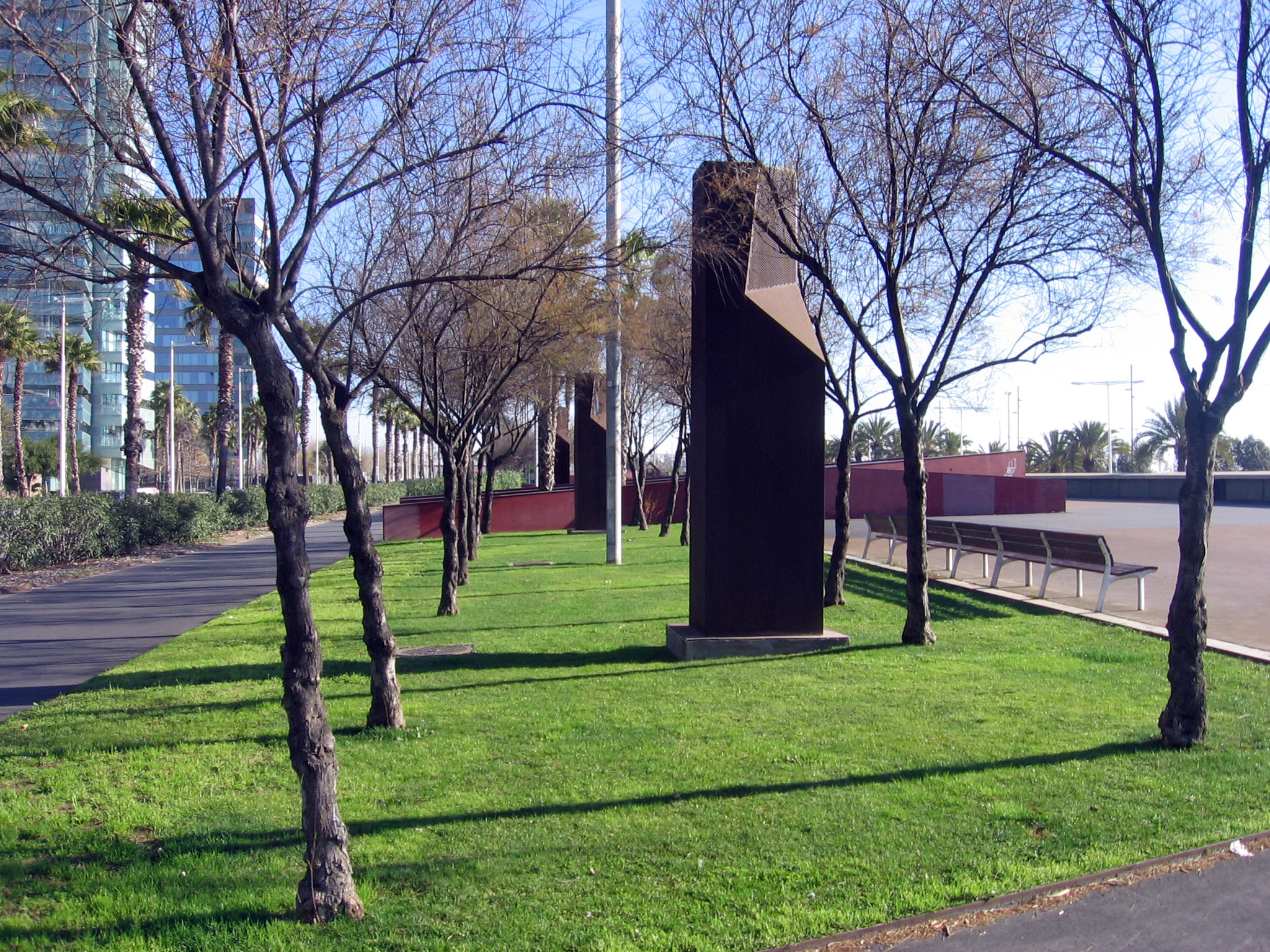 Parque Lineal Garcia Fària, Barcelona.